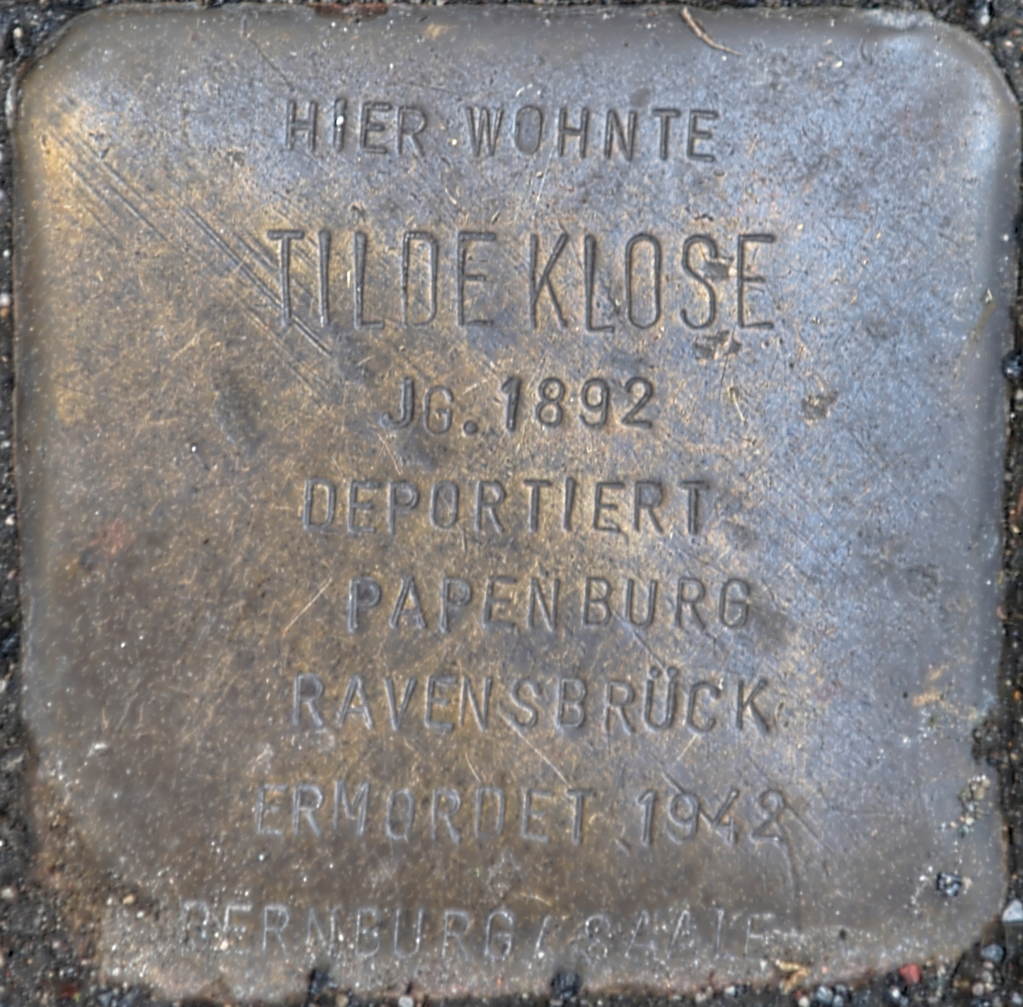 Stolpersteine in Solingen